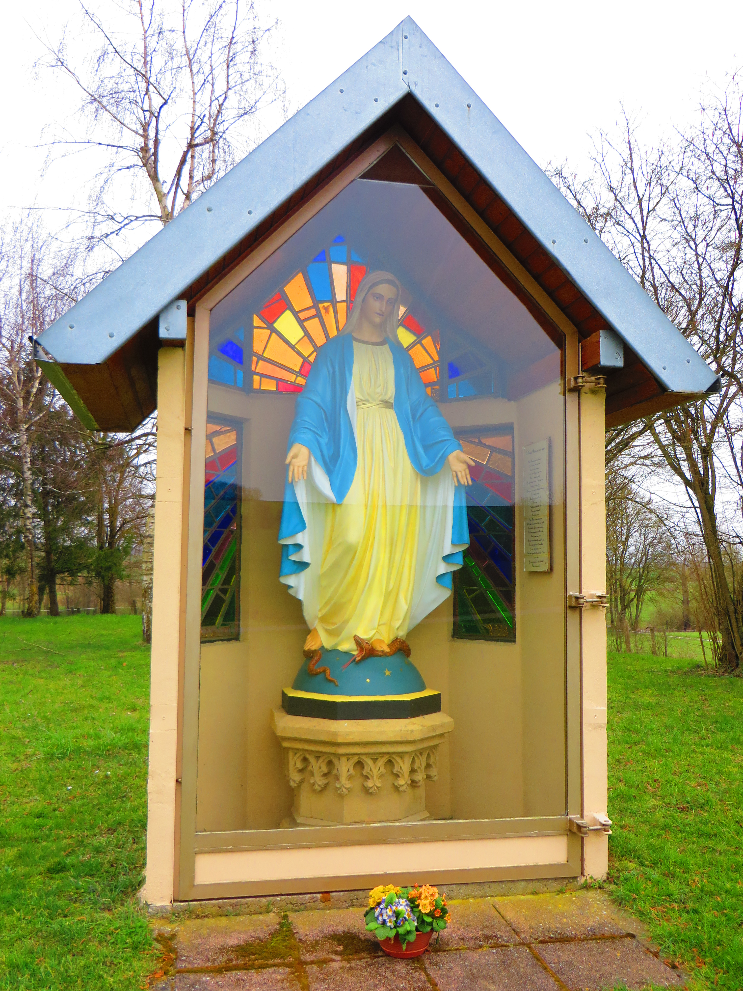 Rahling chapelle oratoire